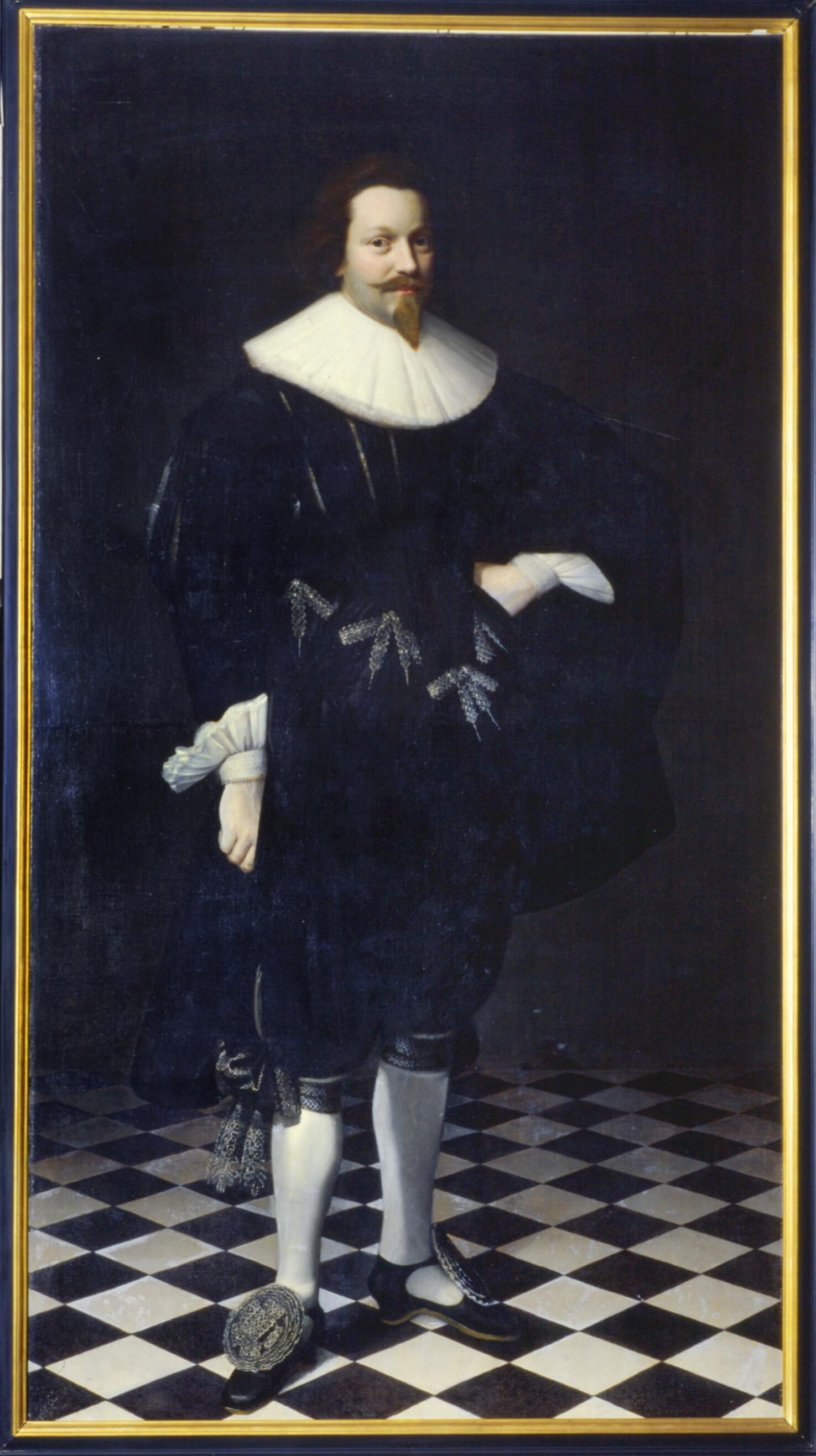 Dr. Dirck de Graeff (1601-1637), vroedschap und schepen von Amsterdam